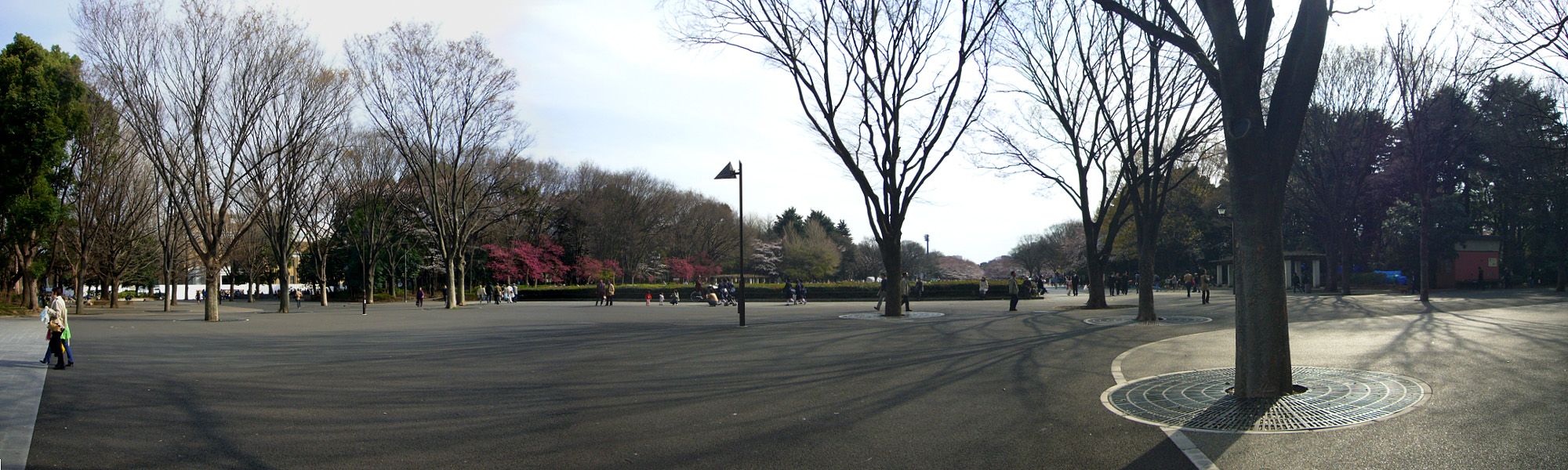 Ueno Park, Tokyo, Japan